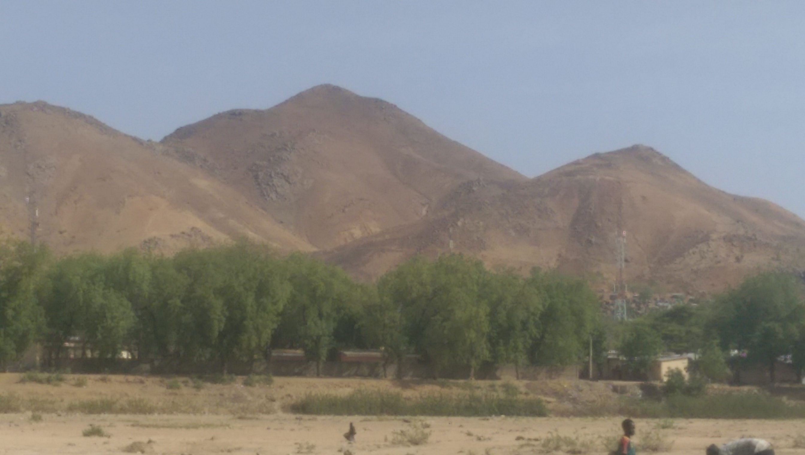 Montagnes dans le Nord Cameroun